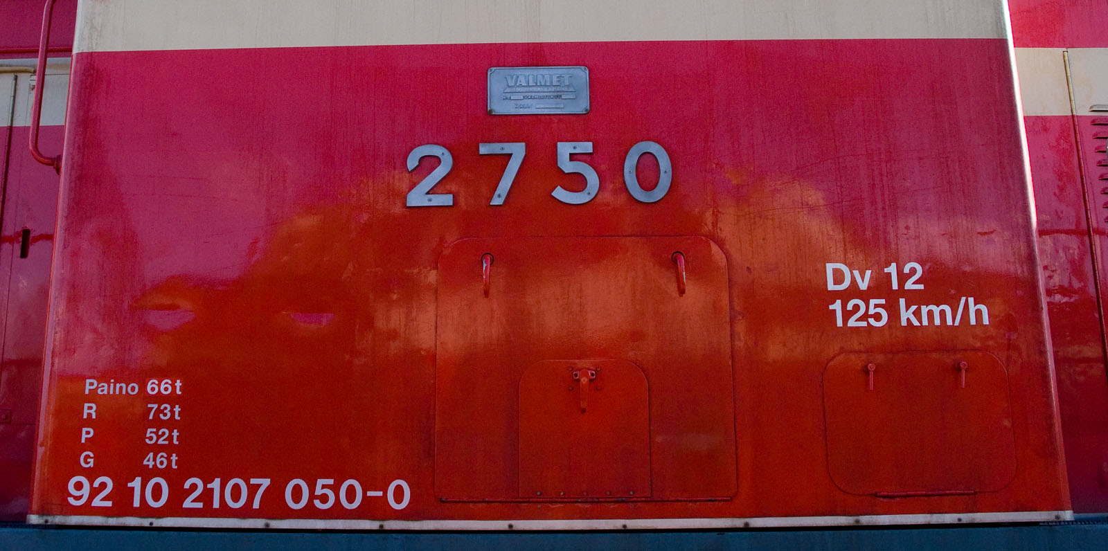 Dv12-veturin o 2750 kylkeen on maalattu sekä VR:n oma Dv12-sarjatunnus että Eurooppalaisen standardin mukainen EVN-numerosarja.